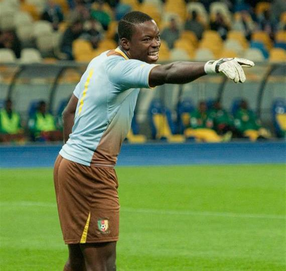 Семмі Нджок — камерунський футболіст, воротар